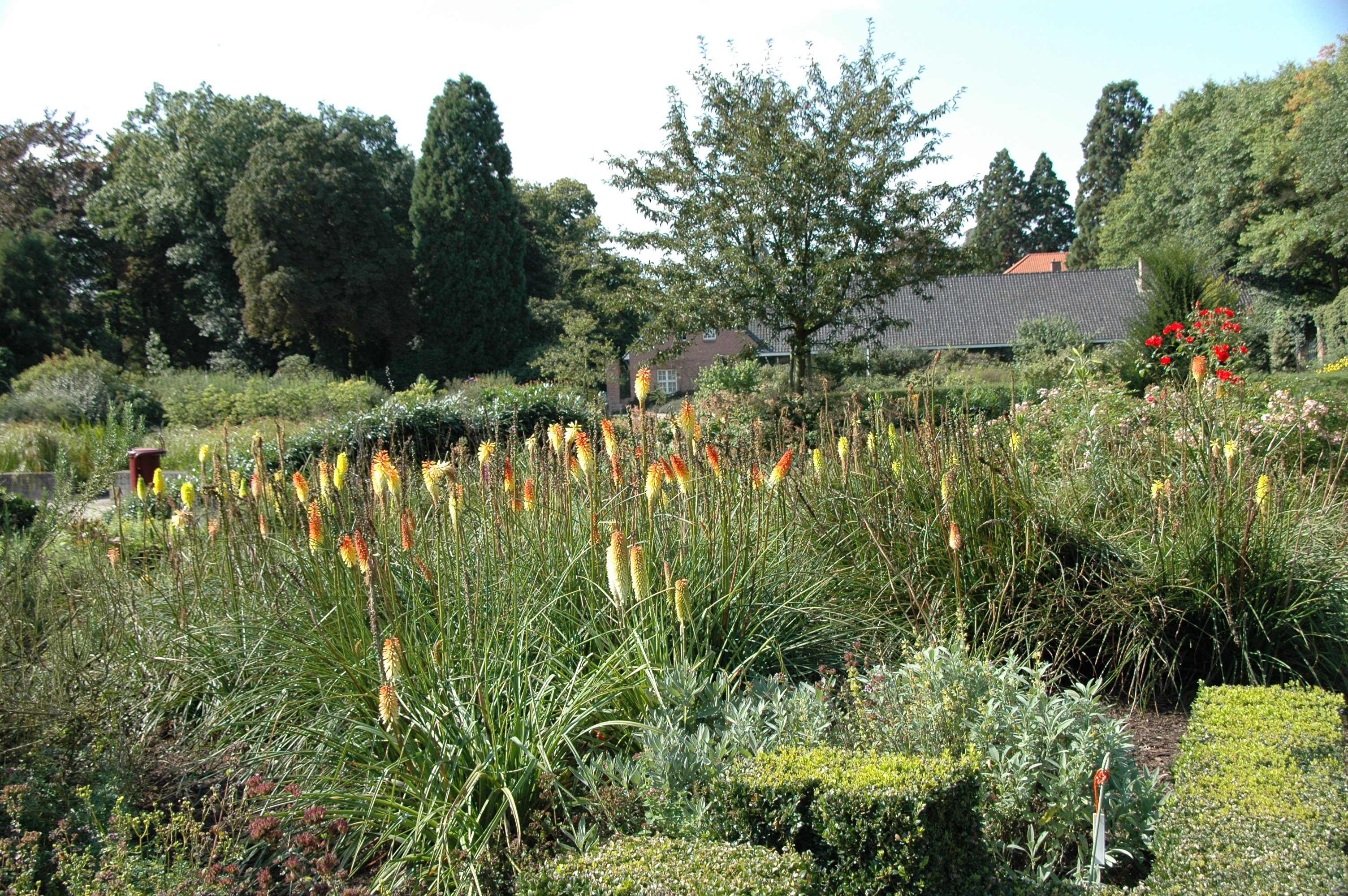 Openluchtmuseum Bokrijk, Domein Borkrijk, de Geuren en Kleurentuin bij het kasteel en de speeltuin van Bokrijk, tuinaanleg op bloeiwijzen, seizoensvullende kleuren en geurende planten.